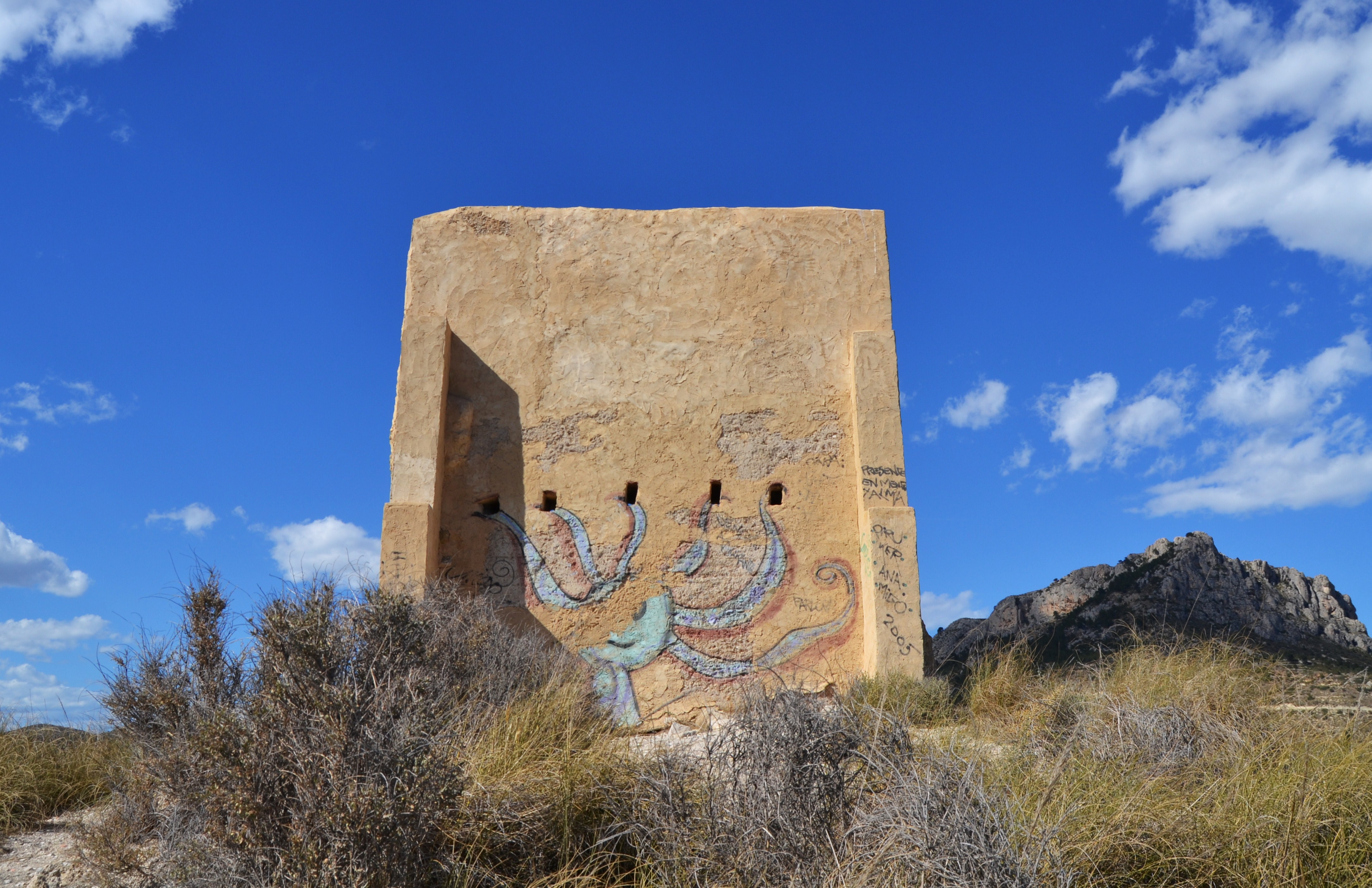 Restes de la torre o castellet del Mascarat, Calp.